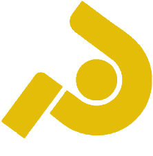 لرستان